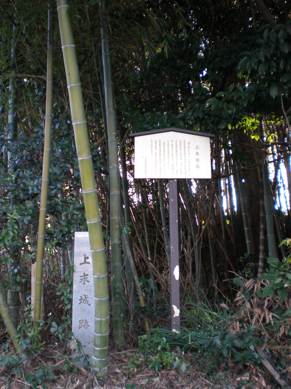 愛知県小牧市にある上末城跡地